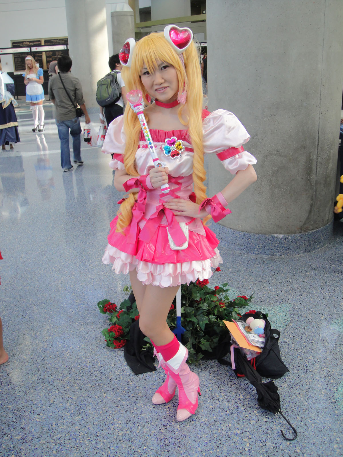 Anime Expo 2010 - LA